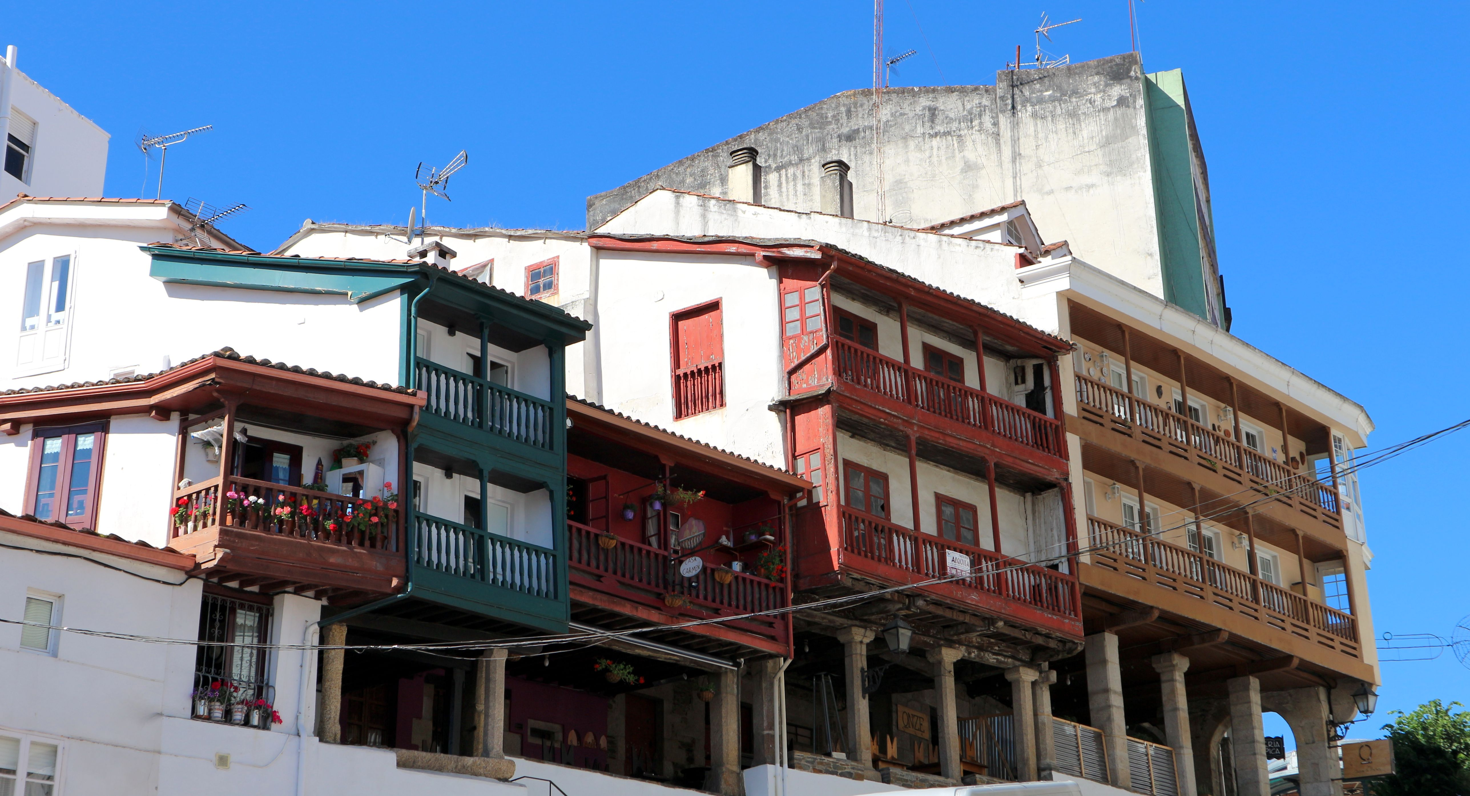 Casas de Fonte de Unta, Betanzos.